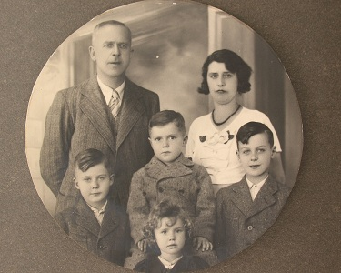 famille André Gascard